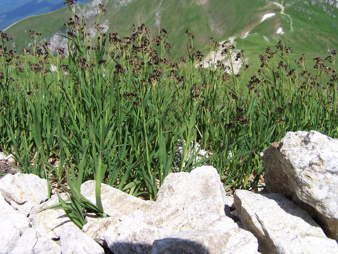 Luzula spadicea =Luzula alpino-pilosa (pl. kosmatka brunatna), habitat: Tatra Mountains, Ciemniak)